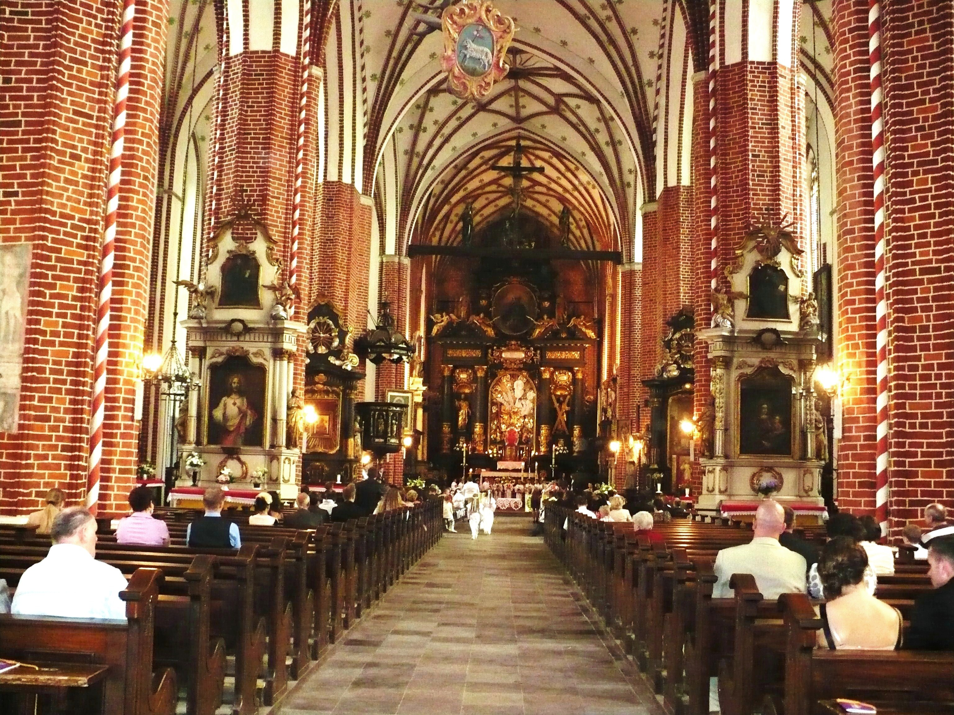 Gotycka konkatedra w Chełmży-wnętrze świątyni